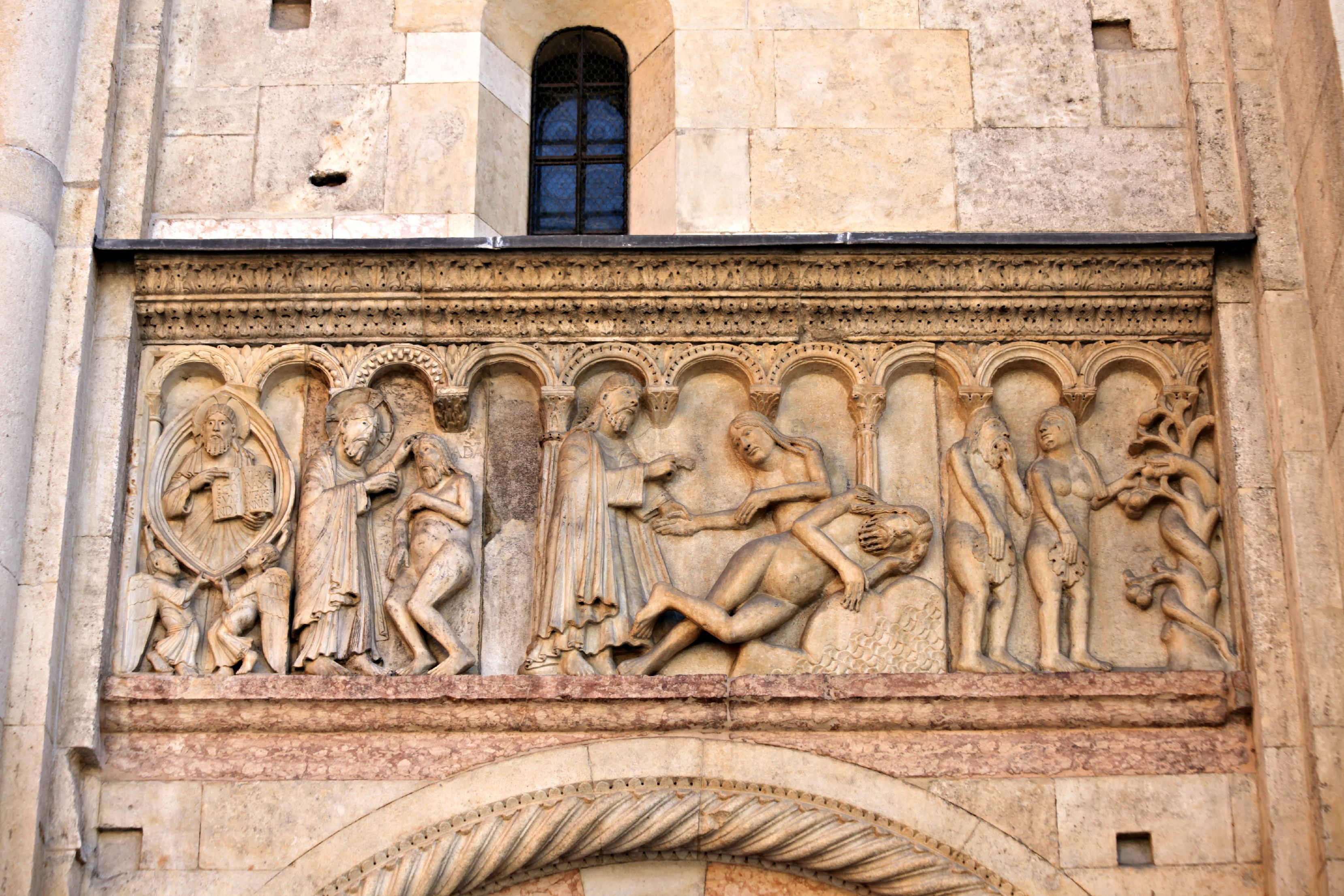 Duomo (solo esterni) This is a photo of a monument which is part of cultural heritage of Italy.